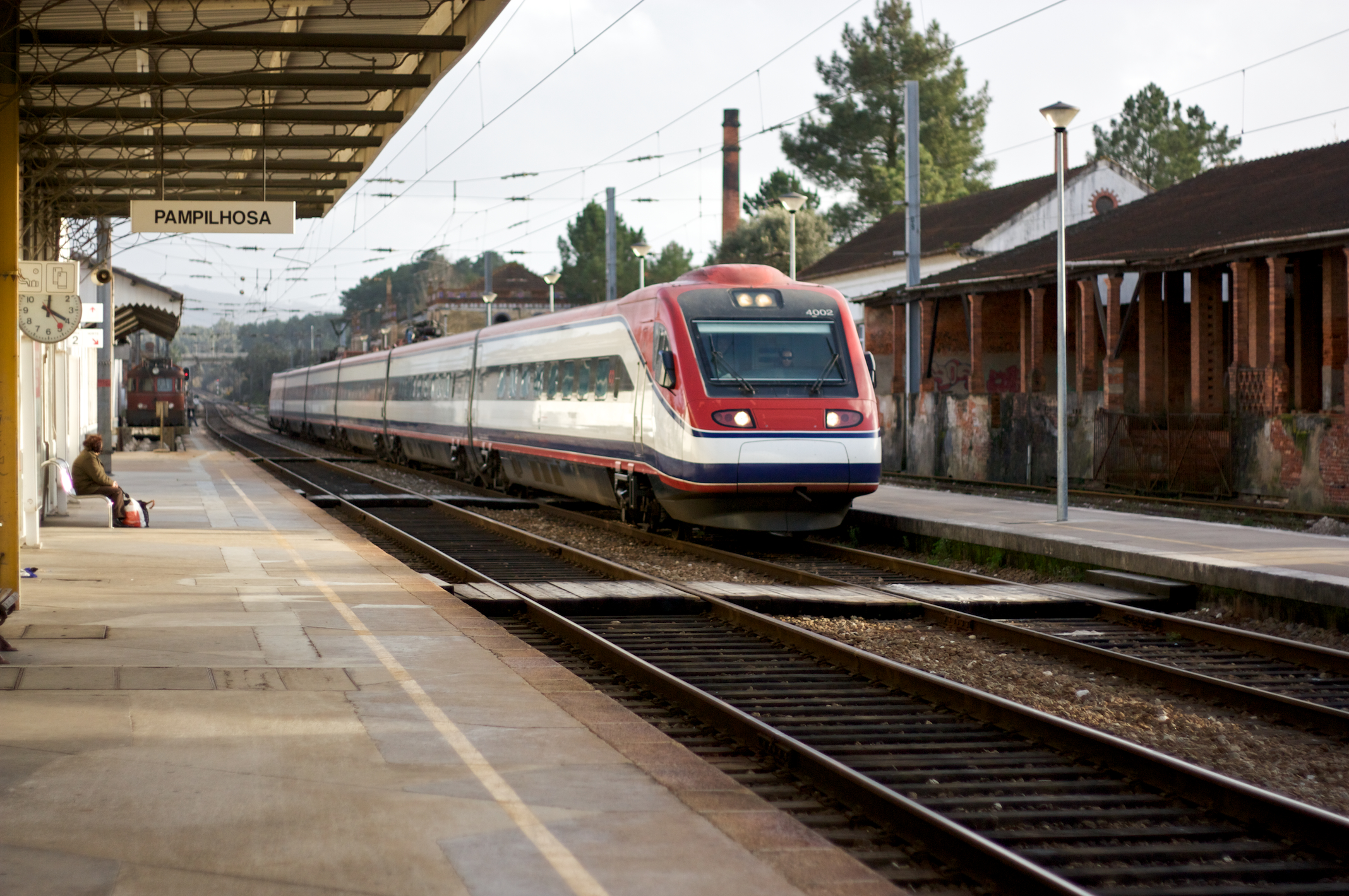 Tipo: Comboio Alfa Pendular 133 [Lisboa • Santa Apolónia - Braga] Local: Estação da Pampilhosa [Linha do Norte, PK 231 • Linha da Beira Alta, PK 50] Data e hora: 24 de Janeiro de 2009 [15h59] Material: Automotora 4002 [Comboio de Pendulação Activa]